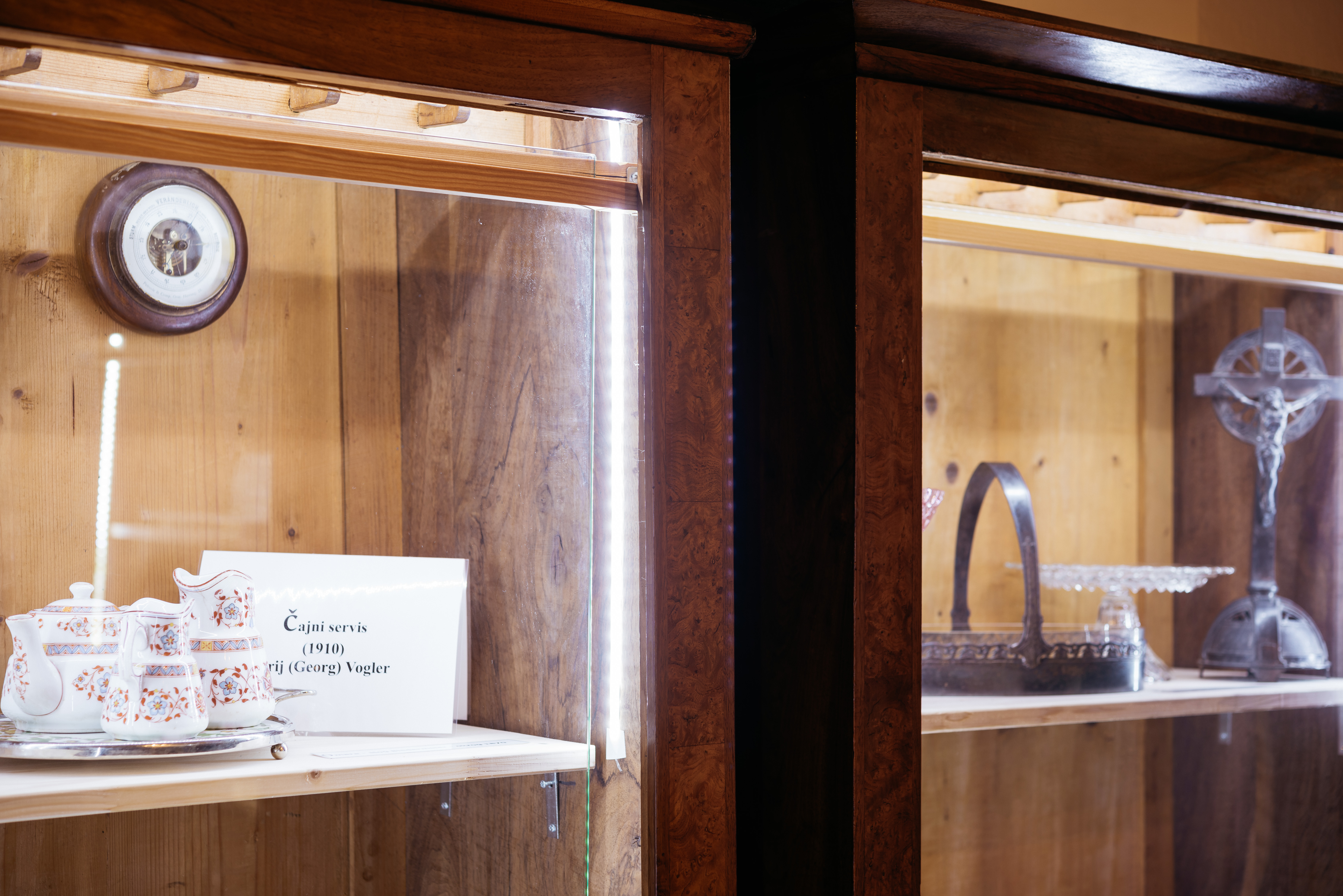 Porcelan družine Vogler na Cankovi